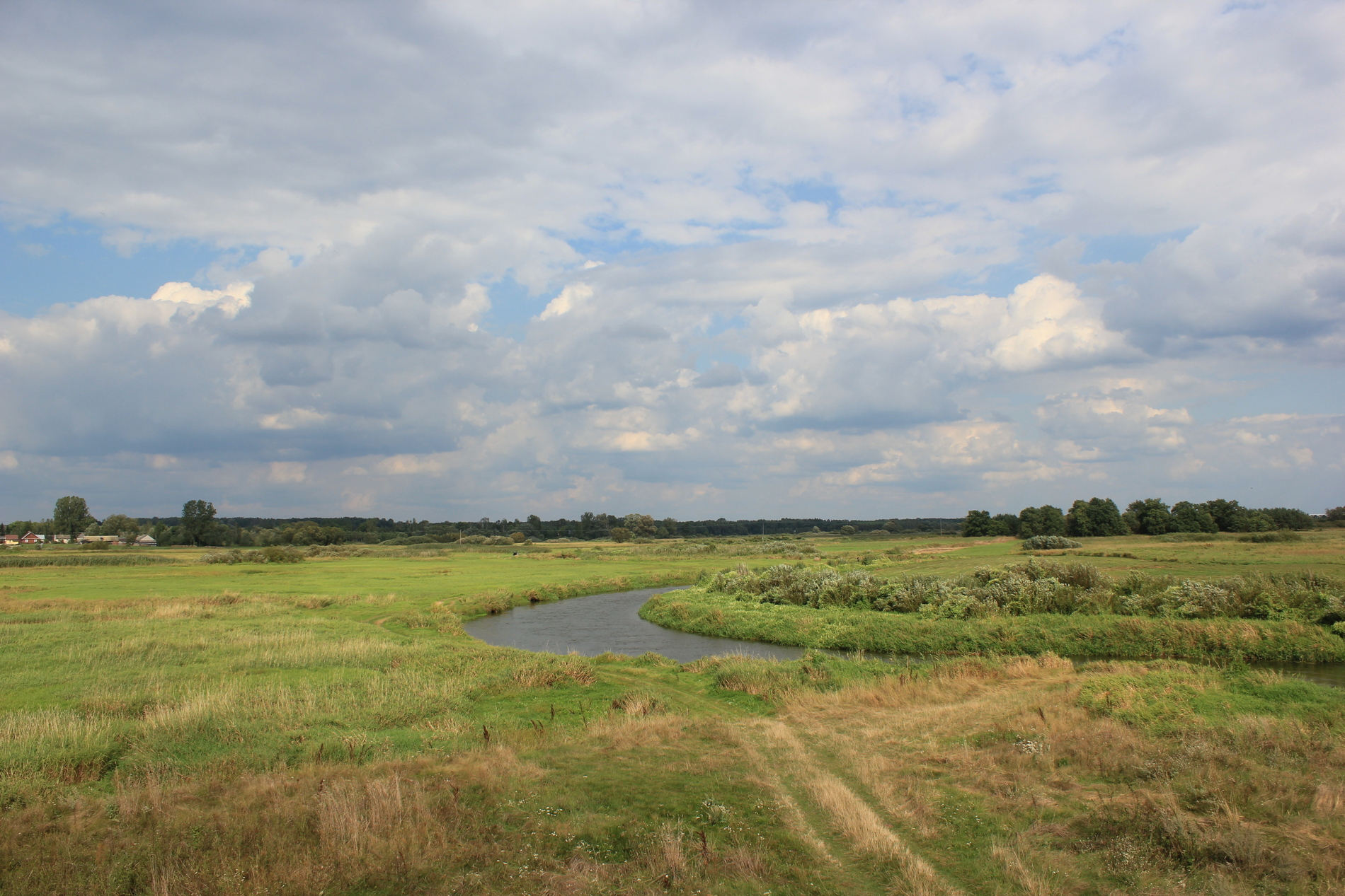 Hornjoserbsce: Rěka Narew blisko wsy Strabla južnje Białystoka, wojewódstwo Podlaska, Pólska.